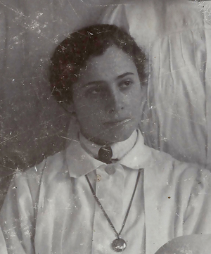 Элеонора Михайловна Тер-Парсегова-Махвиладзе (18 августа 1875 — ?) — учительница, меньшевичка, член Учредительного собрания Демократической Республики Грузия.